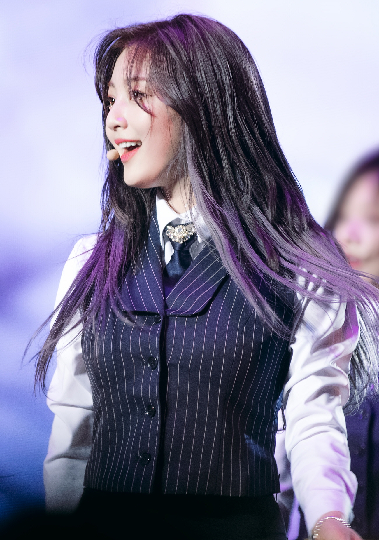 180519 트와이스랜드 마지막 날